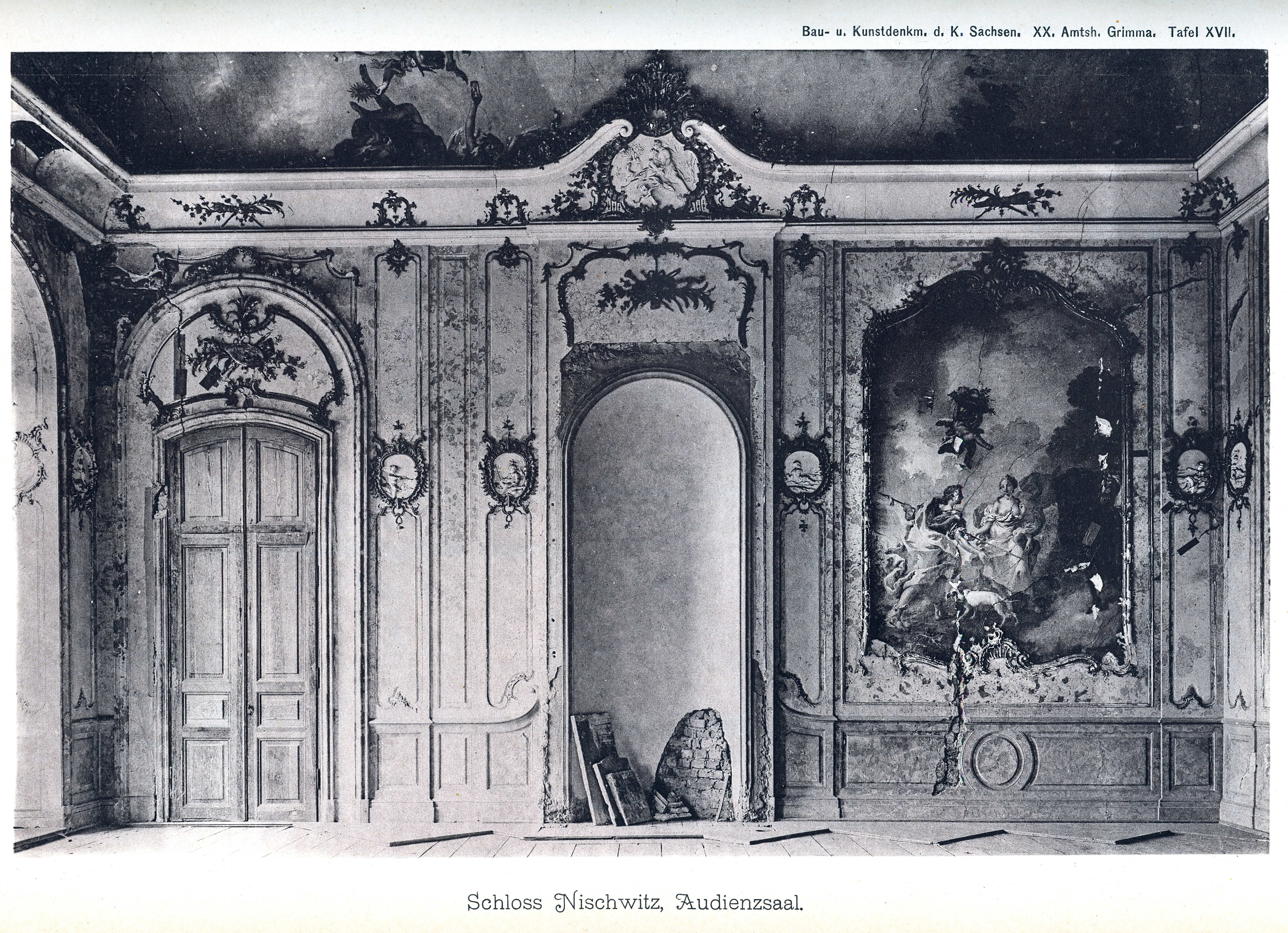 Schloss Nischwitz, Audienzsaal (vor 1898)